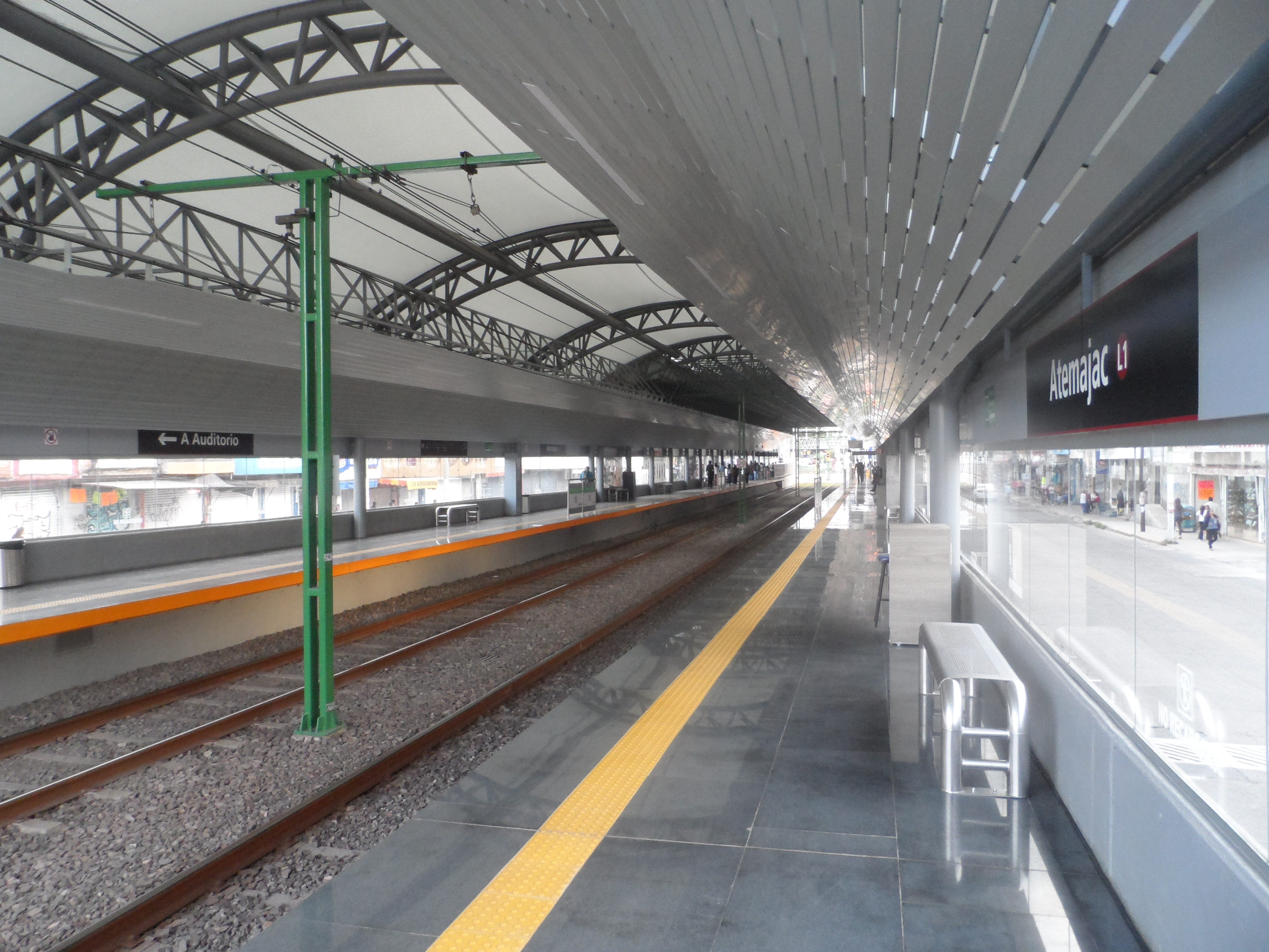 Andenes de la estación Atemajac de la Línea 1 del Tren Ligero de Guadalajara.